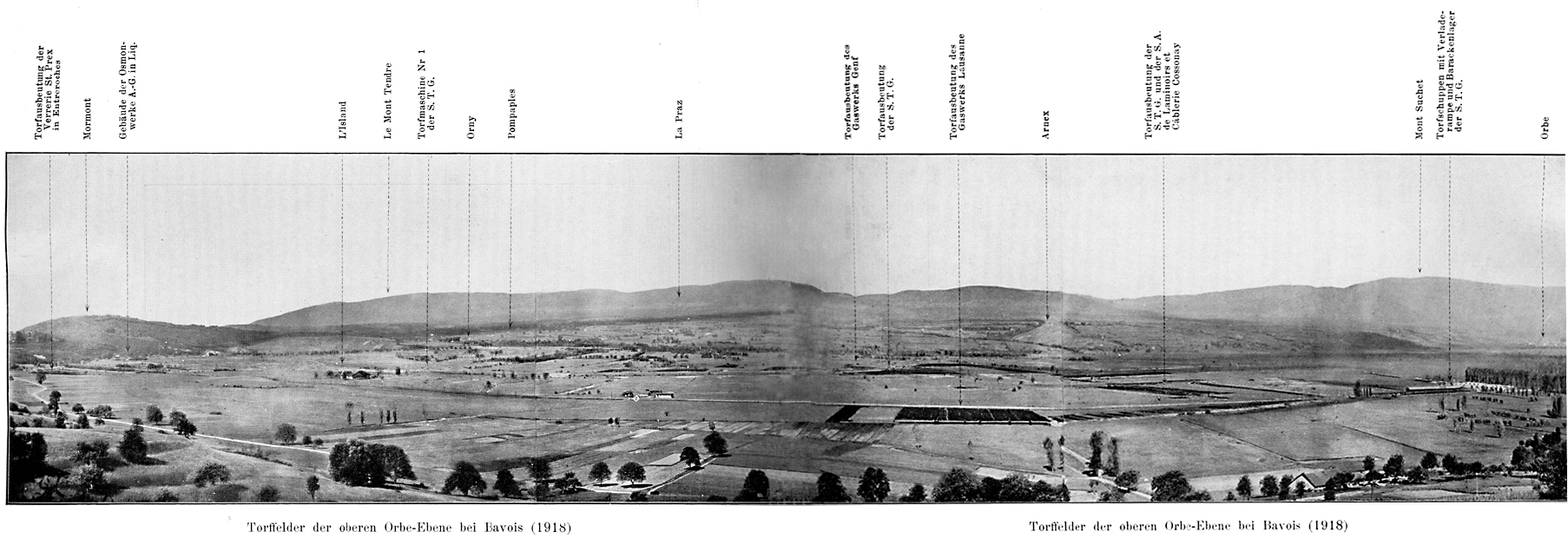 Torffelder der oberen Orbe-Ebene bei Bavois (1918) This is a retouched picture, which means that it has been digitally altered from its original version. Modifications: Diverse Überarbeitungen. Modifications made by Chumwa.